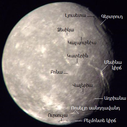 Տիտանիայի մակերևույթի առանձնահատկությունները նշված «Վոյաջեր 2» ԱՄԿ լուսանկարի վրա